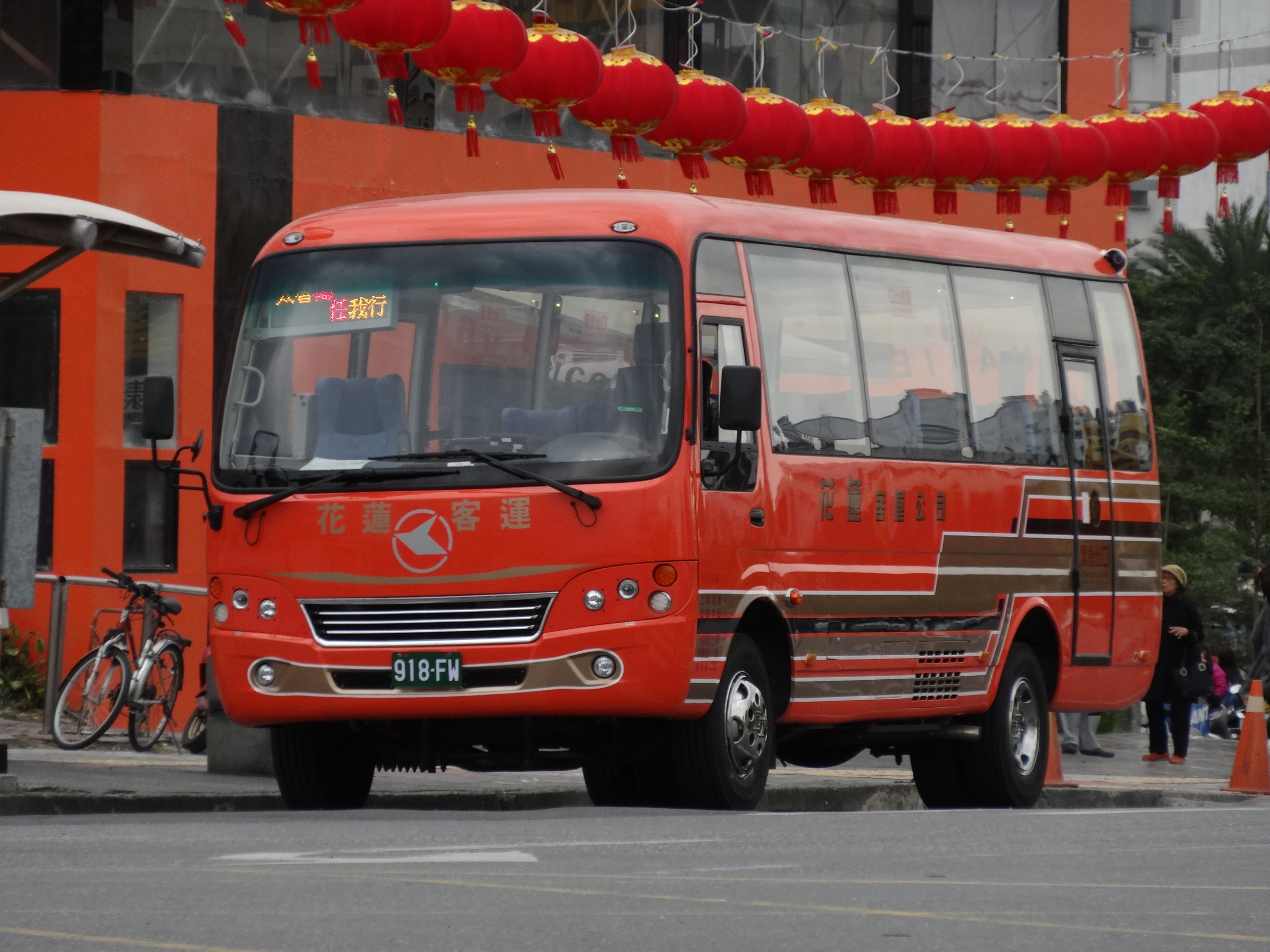 花蓮客運918-FW 中國海格客車(蘇州金龍)製造